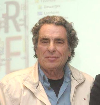 En la 39.º Feria Internacional del Libro (en Buenos Aires), el 30 de septiembre de 2011 presentamos la charla «40.30.10 - Héctor Cámpora, Raúl Alfonsín y Néstor Kirchner: los puentes de la democracia». Participamos de la charla junto a Nilda Garré (ministra de Seguridad de la Nación), Leopoldo Moreau (legislador UCR), Eduardo Jozami (economista y actual director del Centro Cultural de la Memoria Haroldo Conti), y la coordinación de María Seoane (directora del Centro Cultural Caras y Caretas).